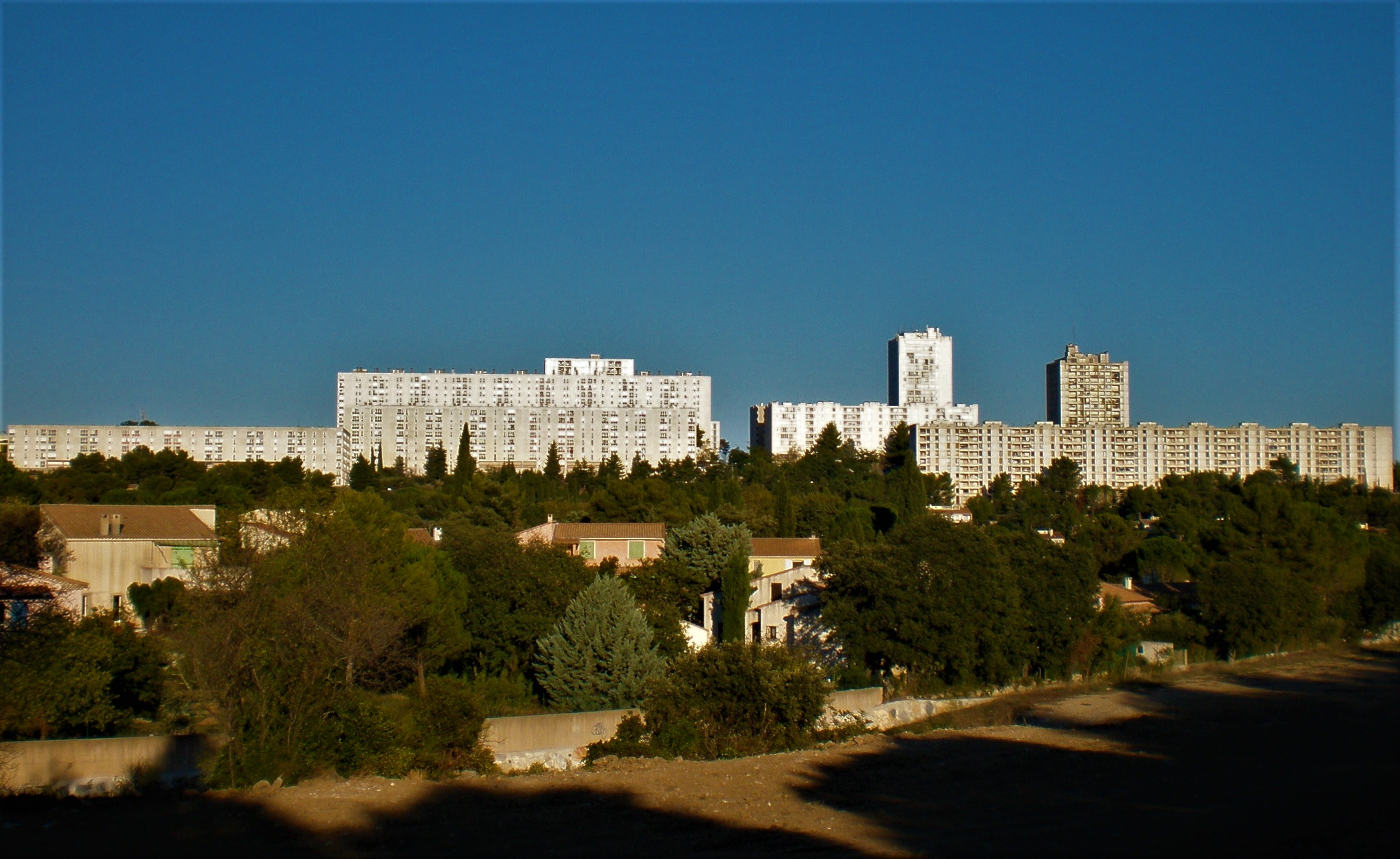 Vue d'ensemble du quartier de Valdegour (ZUP Nord) à Nîmes, Grand ensemble de logements construits dans les années 1960